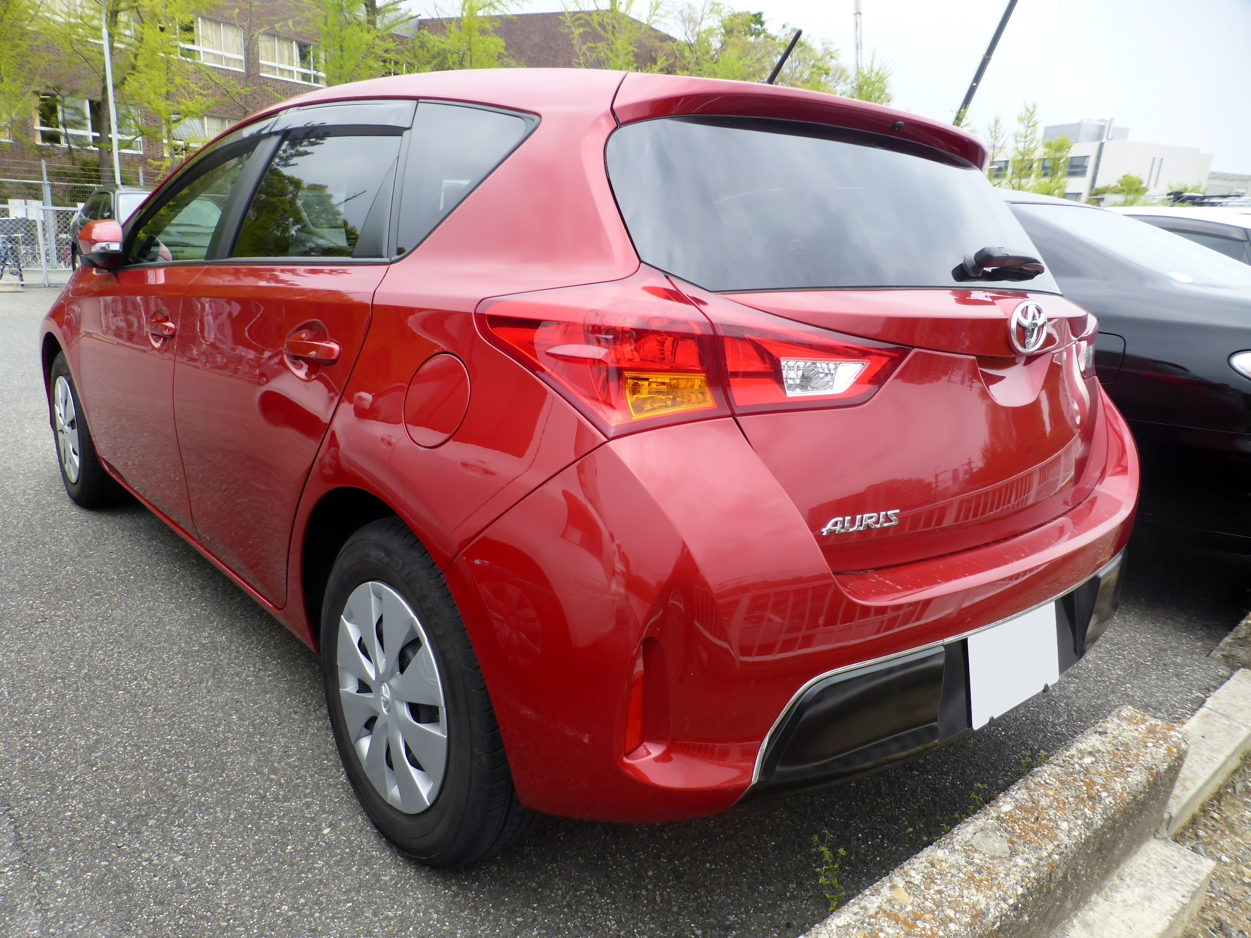 E180型トヨタ・オーリス150Xをリアから撮影。